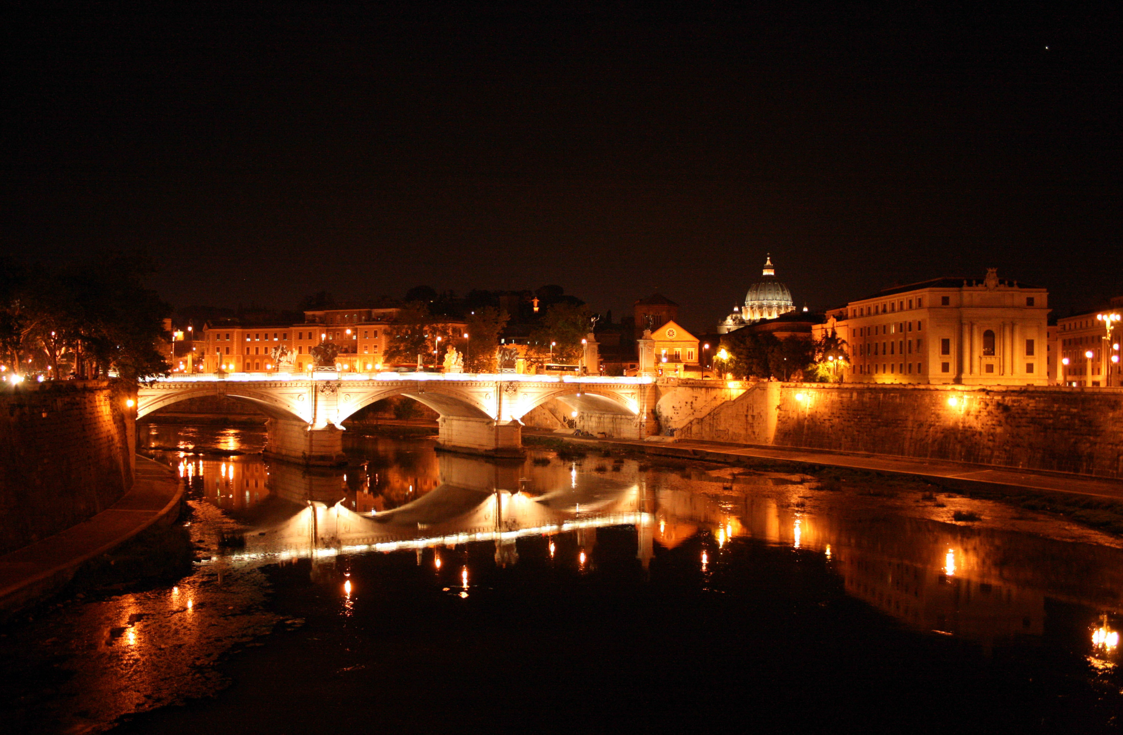 Pont Vittorio Emanuele II à Rome